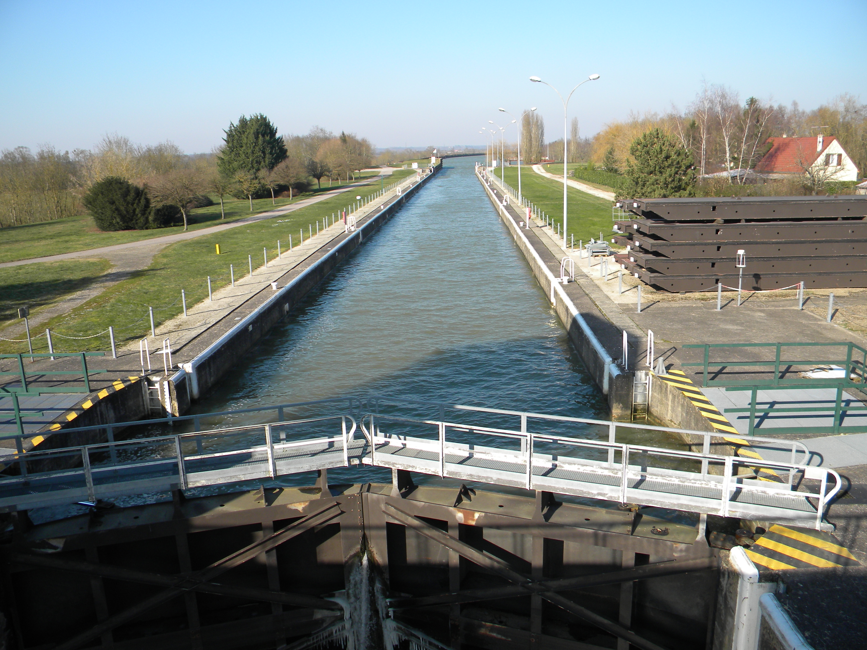 Canal Seurre